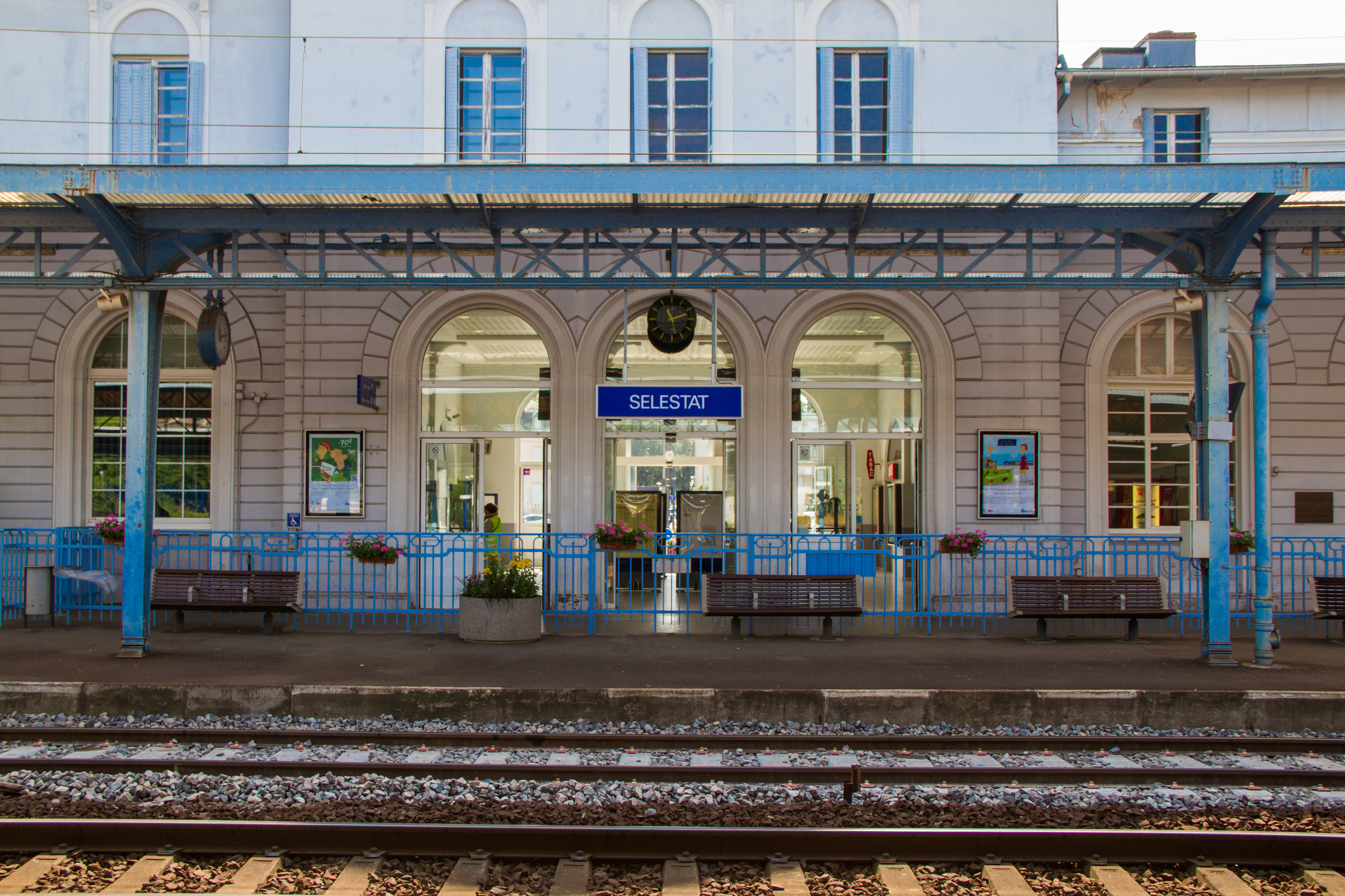 Gare SNCF de Sélestat, l’accès aux quais